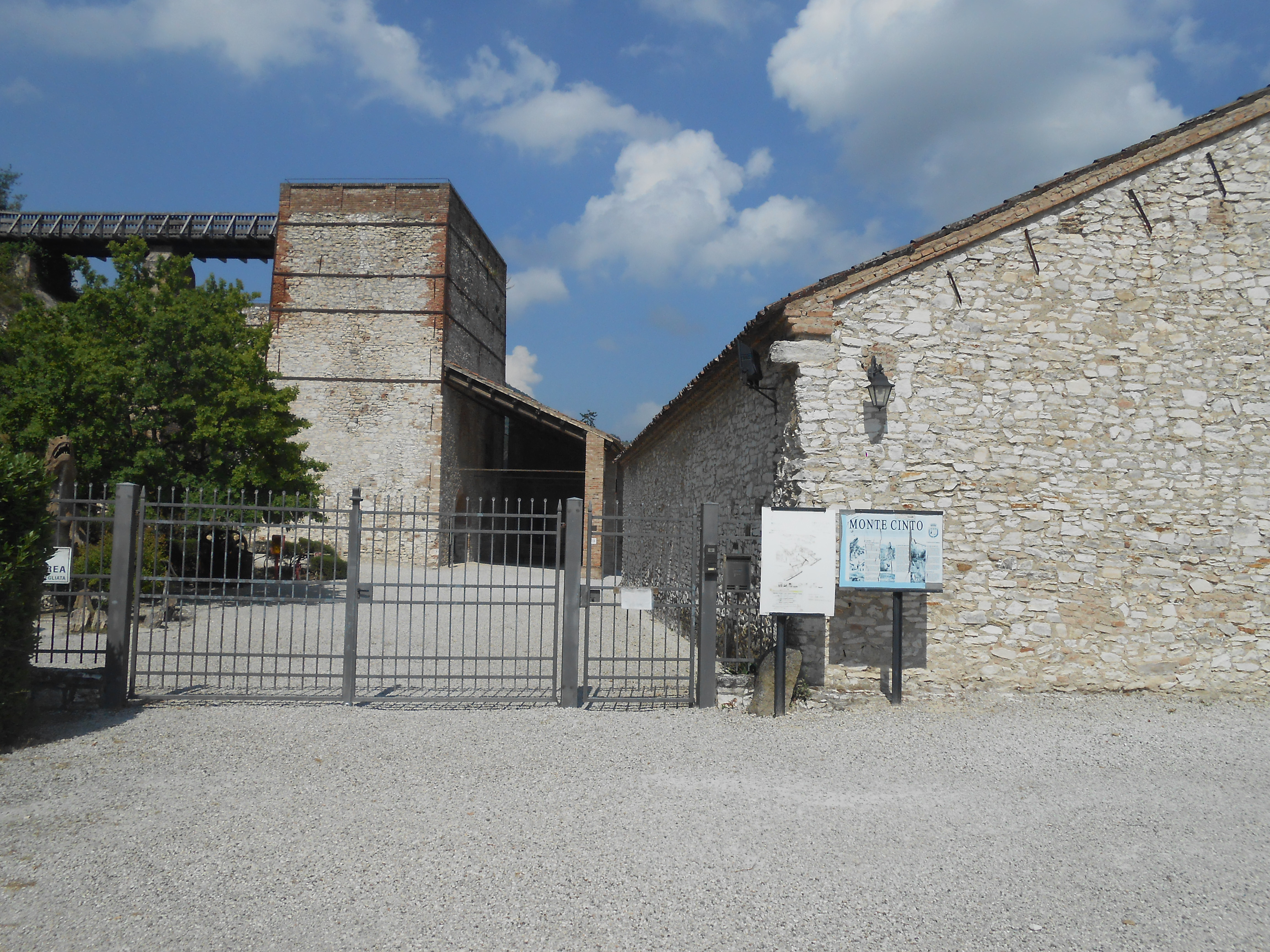 museo, cava bomba, Cinto Euganeo